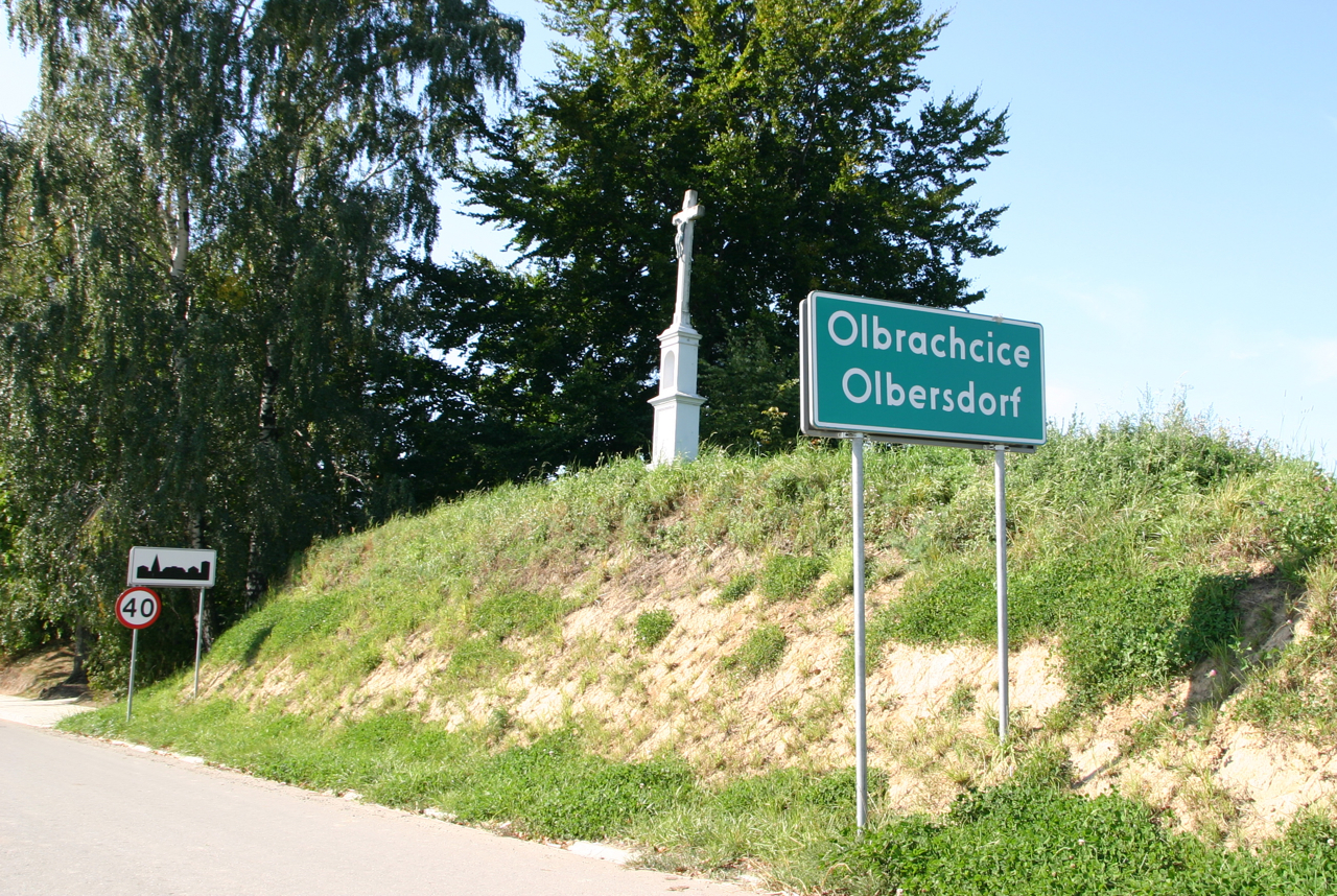 Olbrachcice (dodatkowa nazwa w j. niem. Olbersdorf) – wieś w Polsce położona w województwie opolskim, w powiecie prudnickim, w gminie Biała.